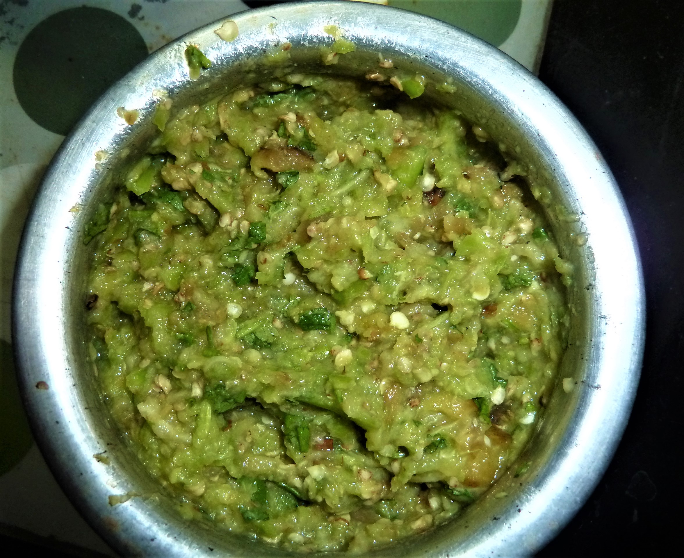 వంకాయ పచ్చిమిర్చి రోటి పచ్చడి